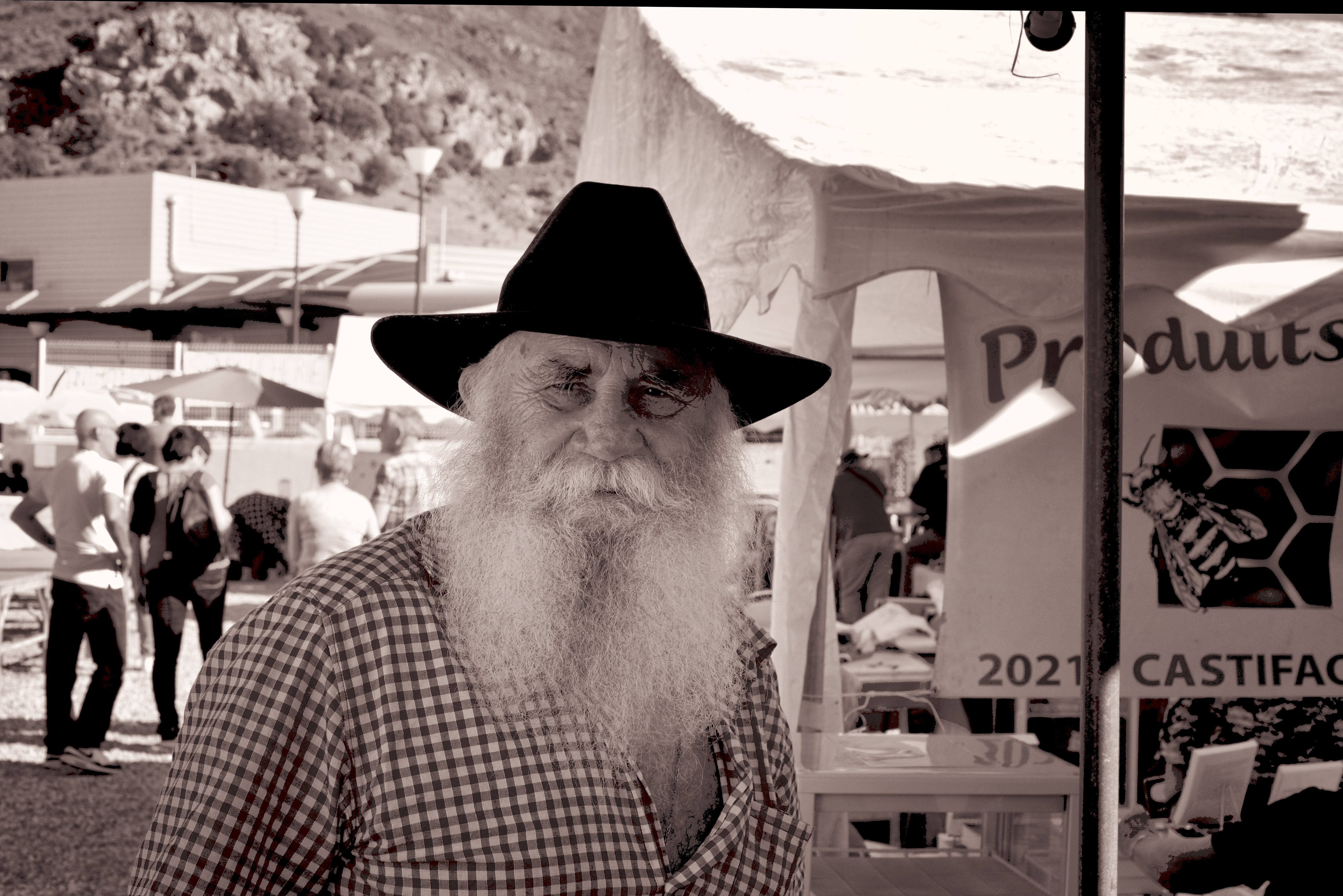 Omessa, Centre Corse - Berger de Moltifao, figure emblématique des foires rurales corses, ici à la foire de Francardo 2015